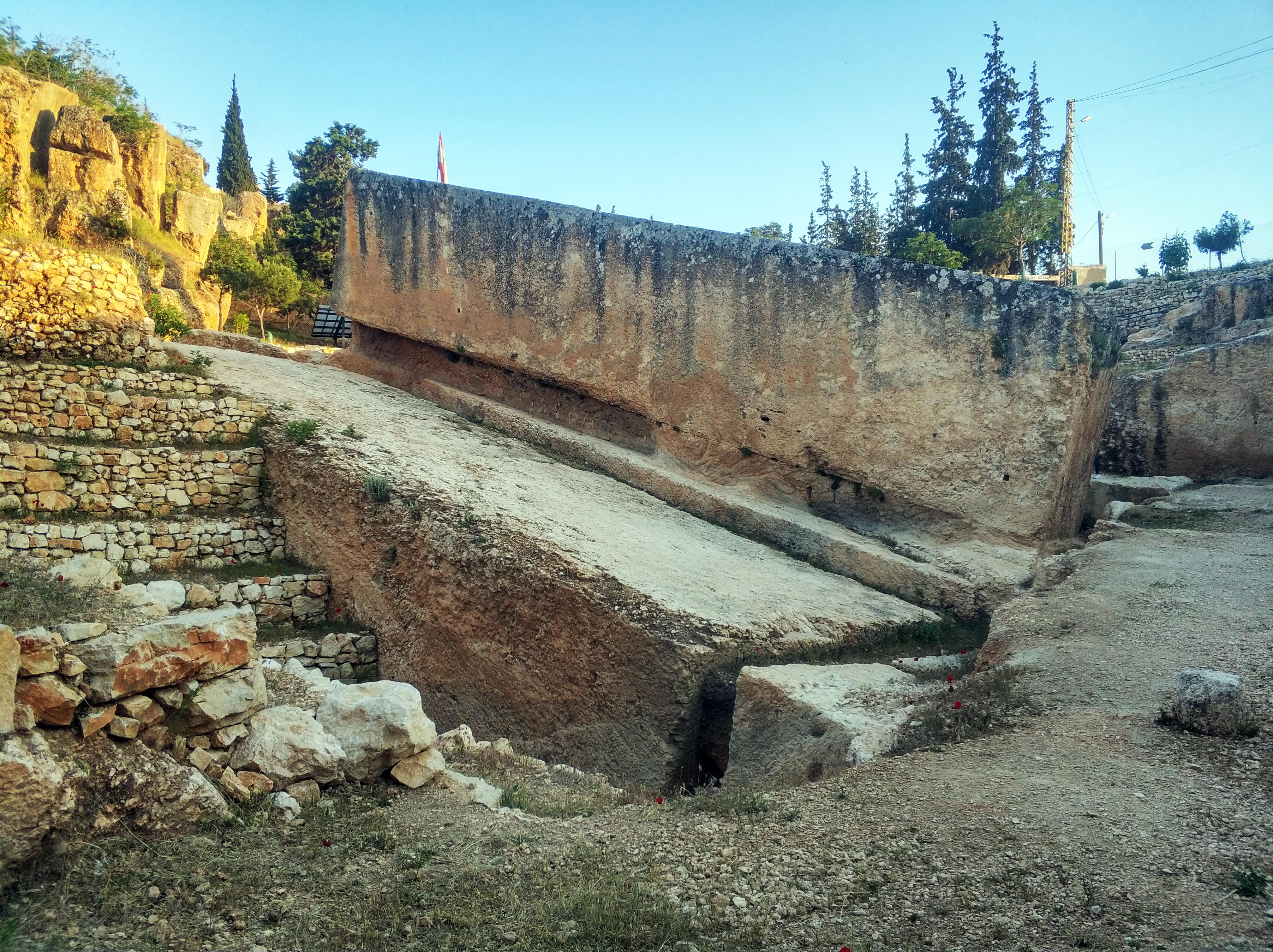 Megaliths in Baalbek quarry, Baalbek, Lebanon